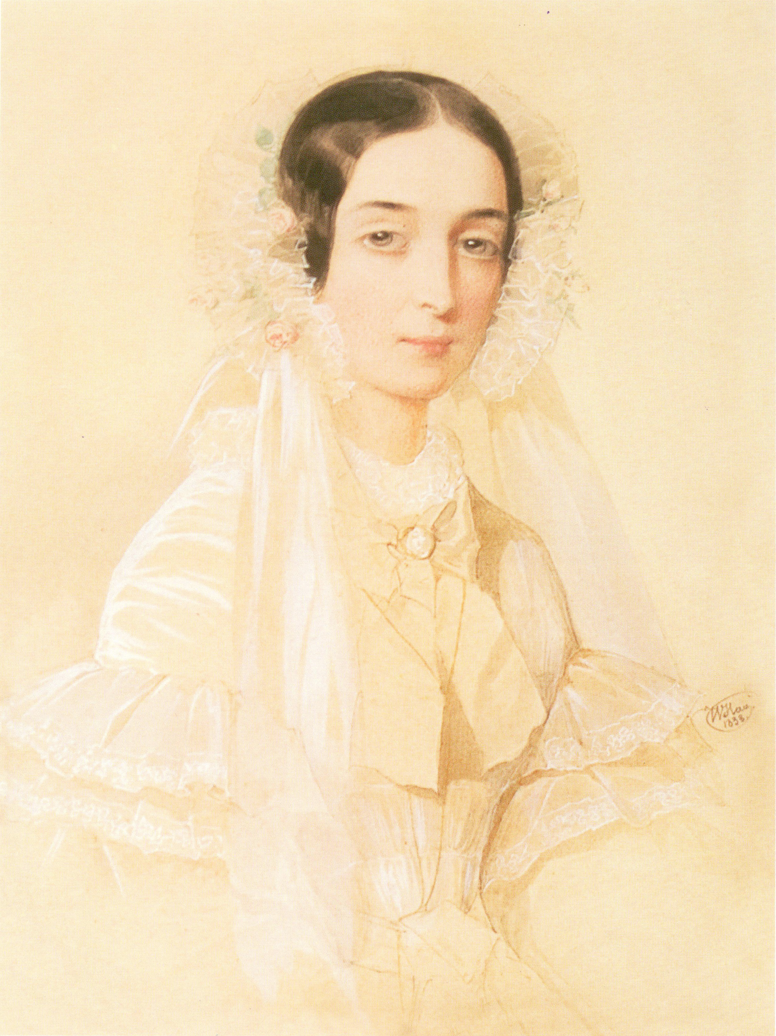 Екатерина Сергеевна Шереметева (1813-1890), дочь С. В. Шереметева от брака с В. П. Алмазовой; с 1829 года замужем за Алексеем Васильевичем Шереметевым (1800-1857).